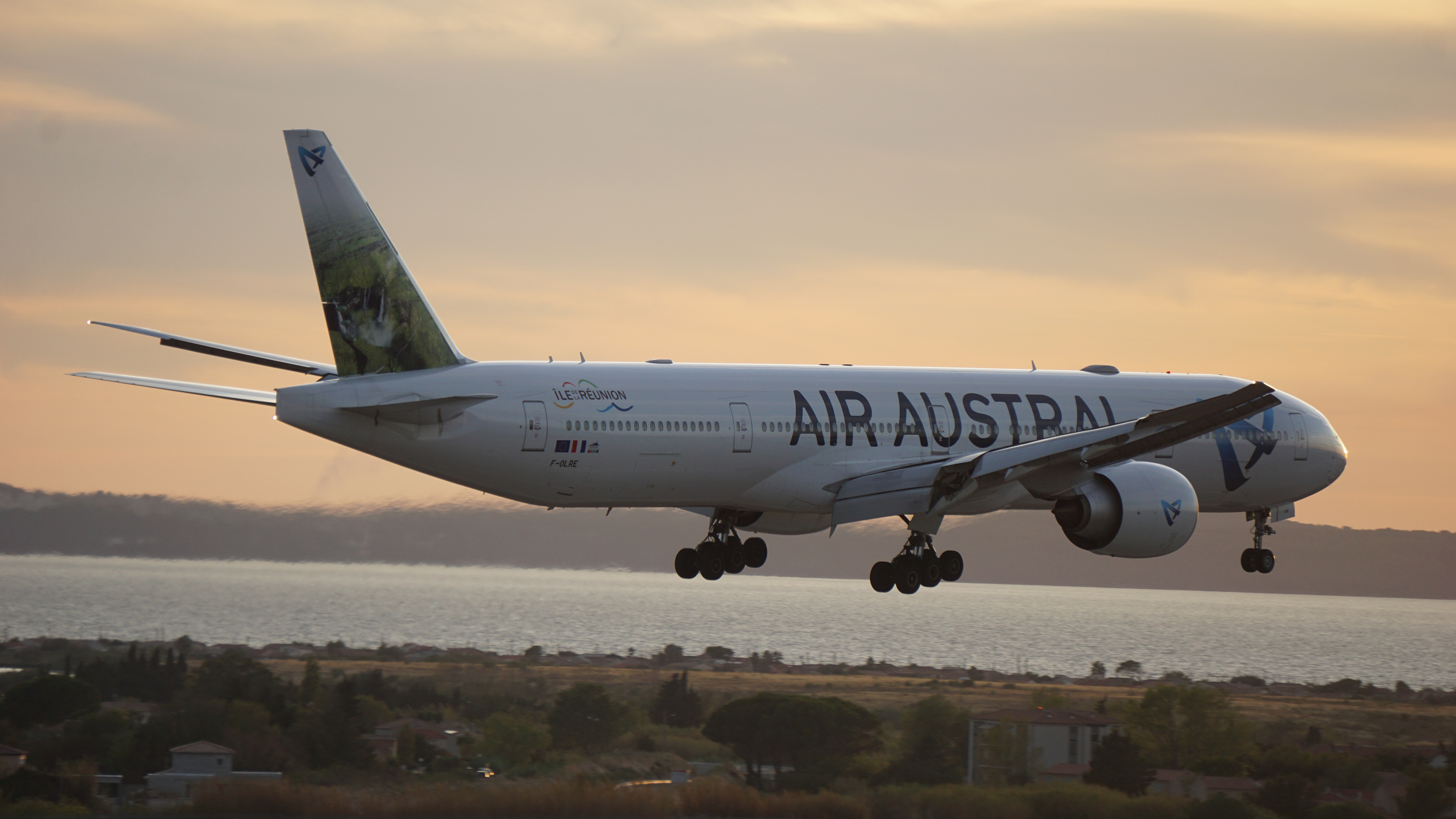 Attérissage du triple sept F-OLRE à Marseille Provence , en provenance de La Réunion .